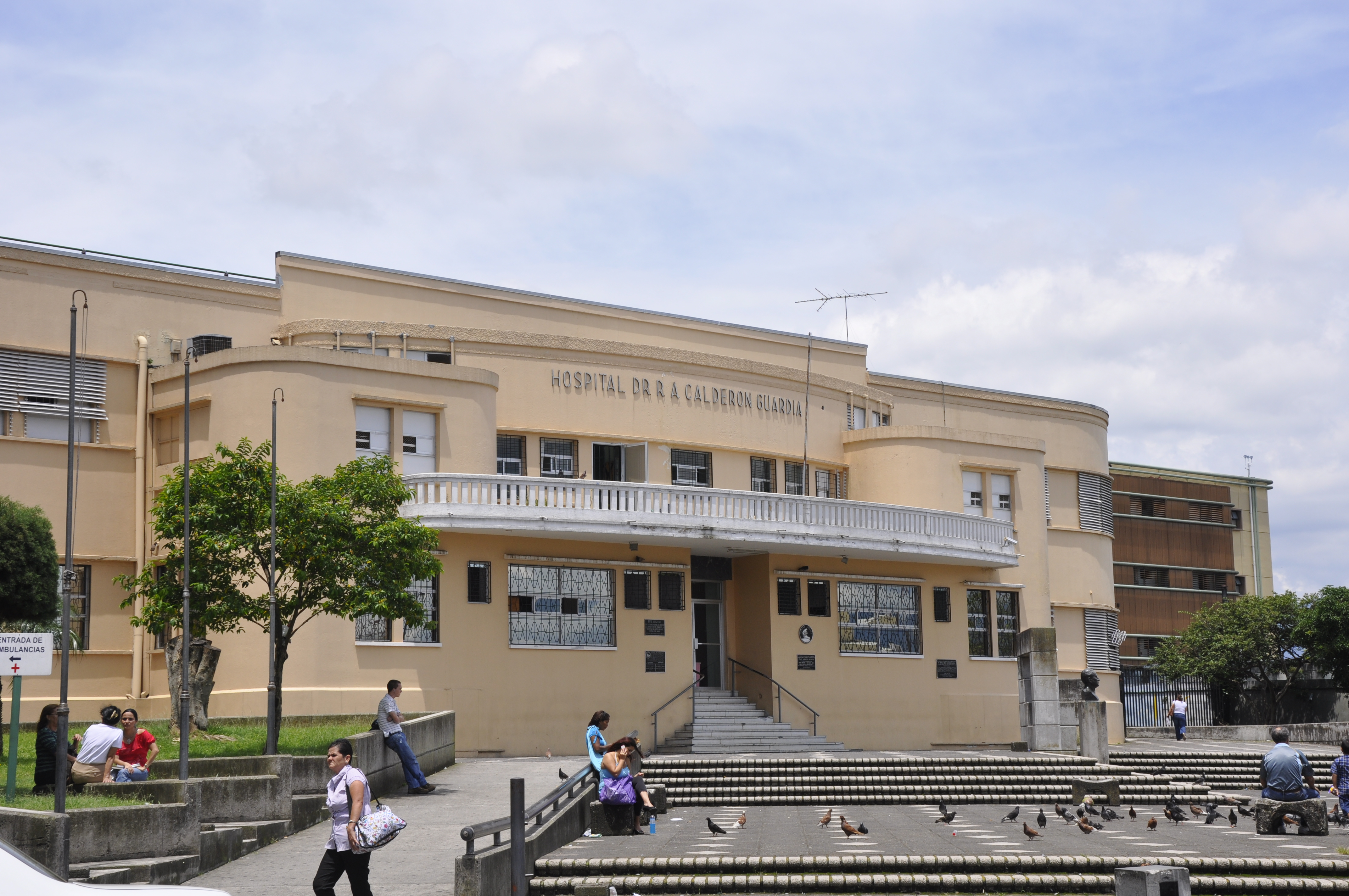 Hospital Dr. Calderón Guardia, Barrio Aranjuez, Costa Rica